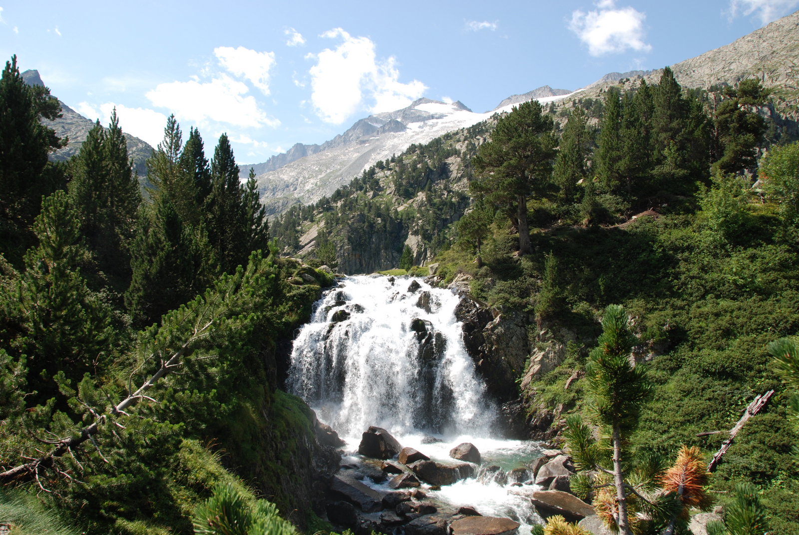 Un excursionista que nos encontramos nos dijo que nunca habia visto la cascada con tanta agua. PD: Si no me equivoco la montaña que se ve al fondo es el Aneto.